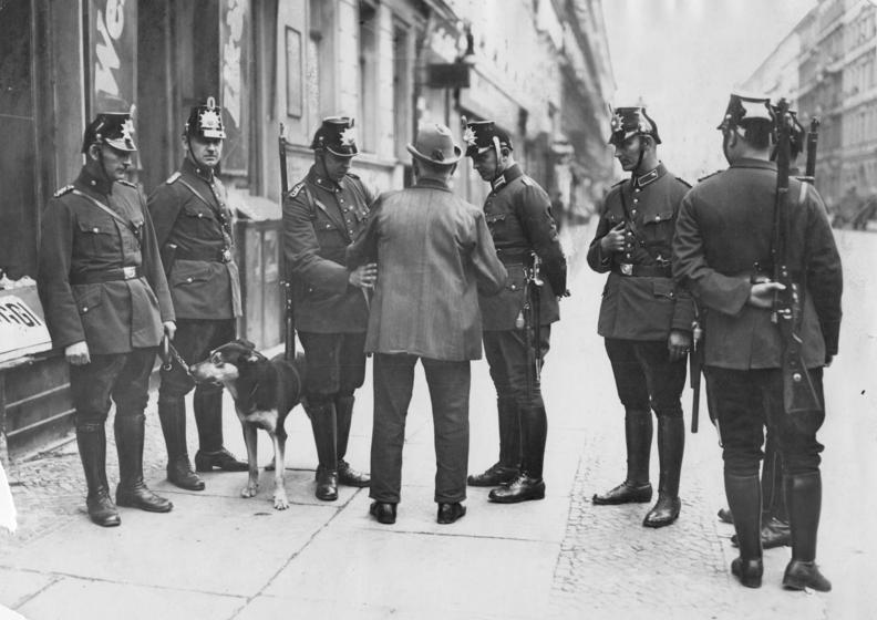 Zentralbild 1931: Ein riesiges Polizeiaufgebot führt eine Großrazzia und Waffensuche in der Kösliner Straße in Berlin-Wedding durch. UBz: ein Passant wird nach Waffen durchsucht. 28 215-31